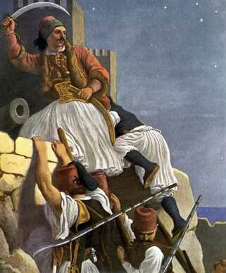 Η κατάληψη των Πατρών. Ο Αθανάσιος Κανακάρης καταλαμβάνει την Πάτρα.